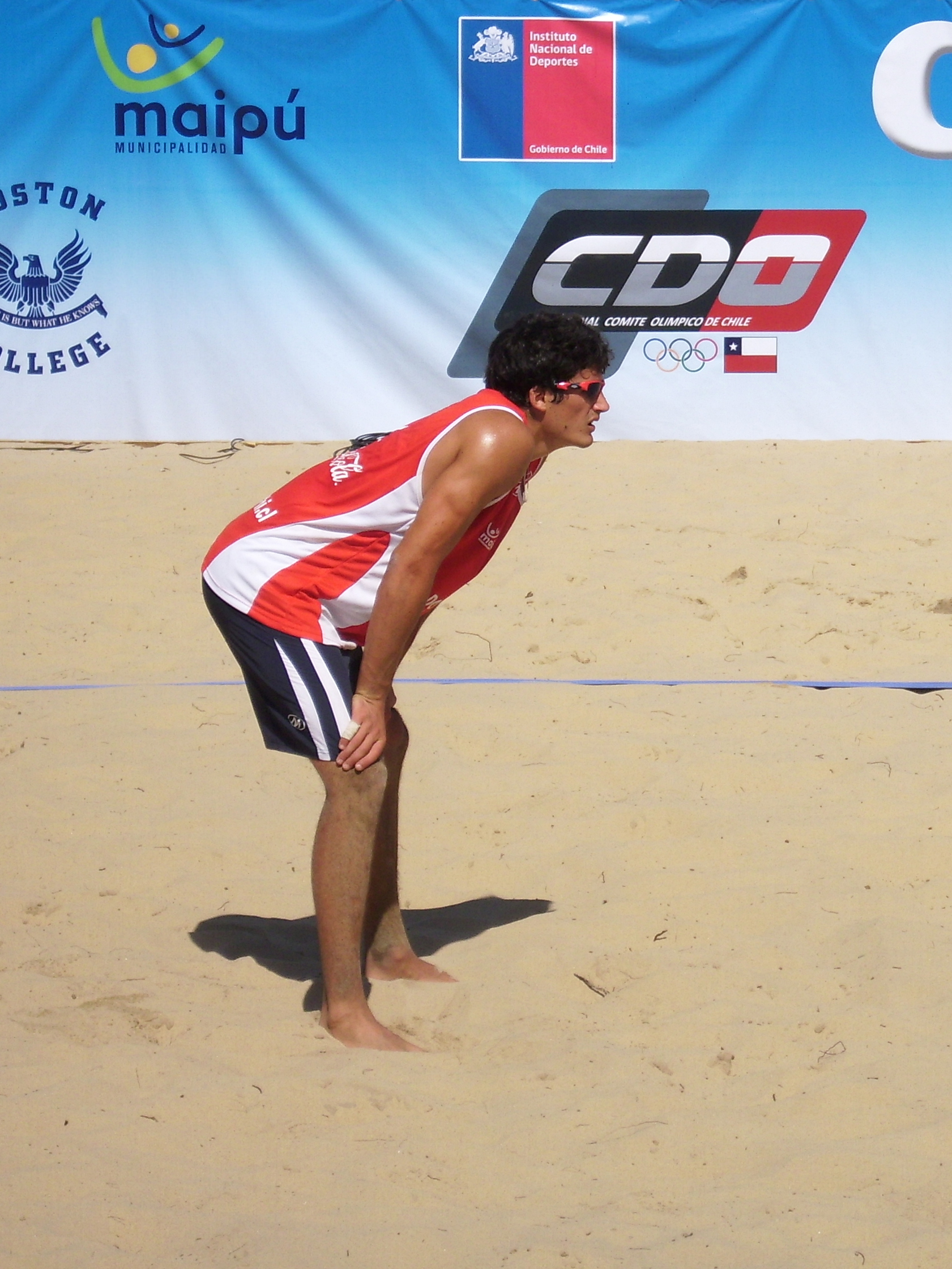 El voleibolista chileno Esteban Grimalt durante uno de los partidos contra la selección brasileña en el Continental Cup, torneo de vóleibol playa clasificatorio para los Juegos Olímpicos de Londres 2012 que se realizó en la Plaza de Armas de Maipú (Santiago de Chile) entre el 24 y el 27 de noviembre de 2011.